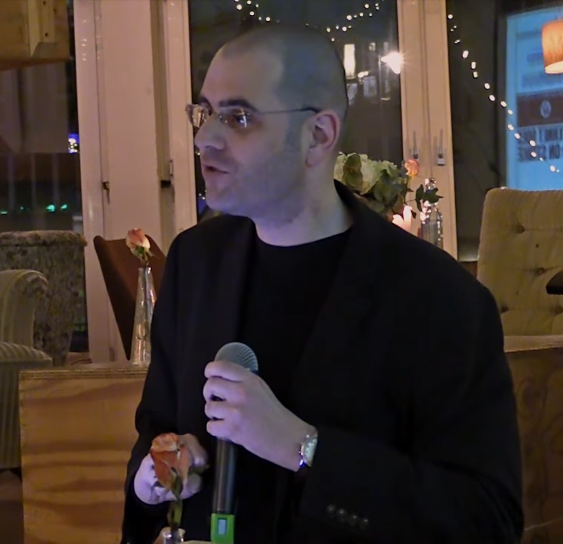 Für eine kritische politische Ökonomie der Medien und des Internets im Zeitalter von Apple, Facebook, Google und Twitter. Luxemburg Lecture von Christian Fuchs. Christian Fuchs stellt in seiner Lecture die Frage, wie man Phänomene wie Apple, Facebook, Google und Twitter kritisch analysieren kann. Es geht um die Untersuchung von Kommunikation im Kontext des heutigen Kapitalismus und seiner Krise. Der beste Ansatz zur Analyse von Kommunikationsphänomenen ist eine gesellschaftskritische Herangehensweise, nämlich jene der Kritik der politischen Ökonomie der Medien. Beispielhaft werden in diesem Vortrag zeitgenössische digitale Medien im Kontext von Kapitalismus, Macht, Ideologie, sozialen Kämpfe und Alternativen betrachtet. Christian Fuchs ist Professor für Social Media an der University of Westminister und Redakteur der Zeitschrift tripleC: Communication, Capitalism & Critique.